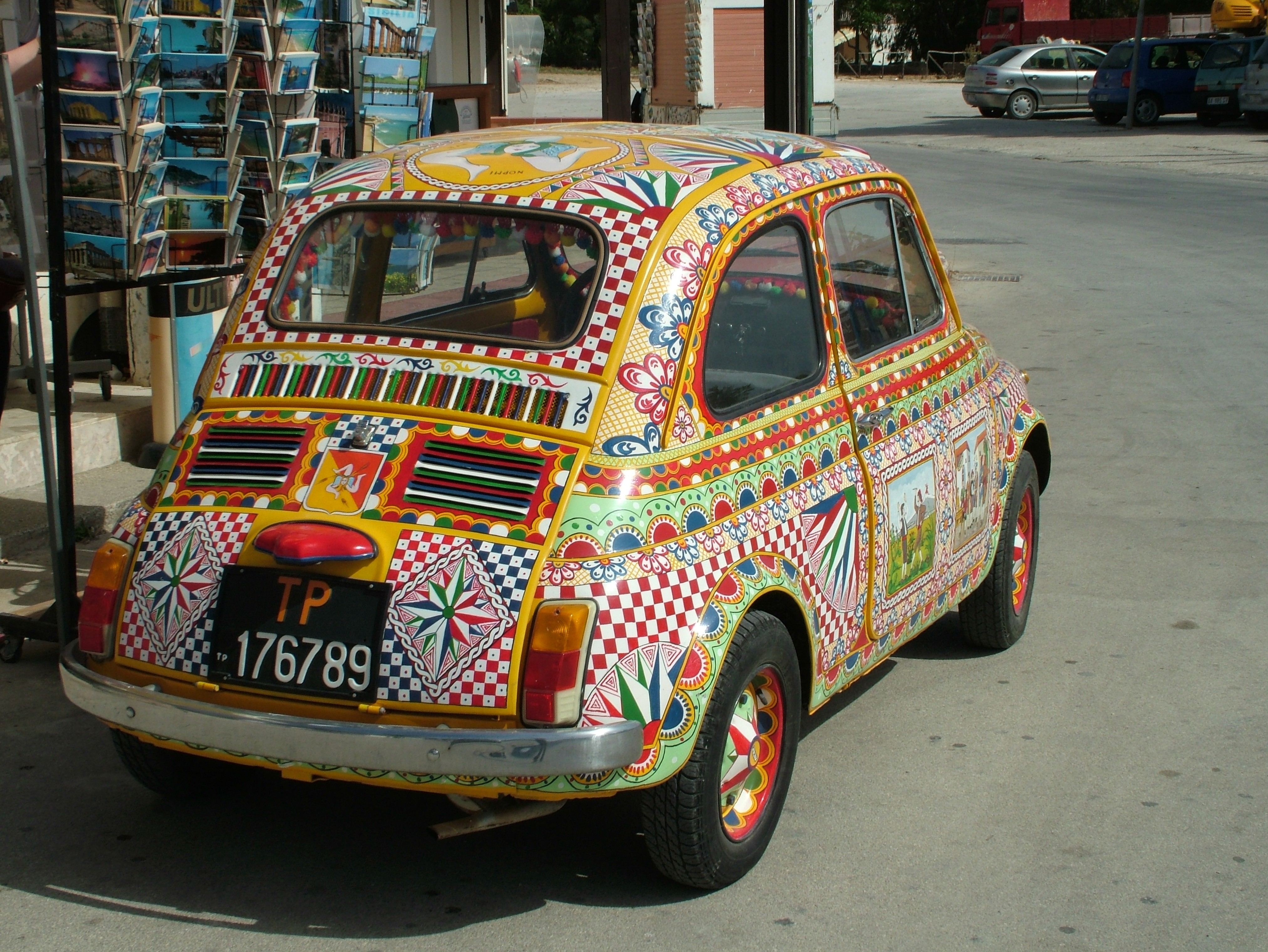 Sizilianisches Auto in Selinunte, Sizilien